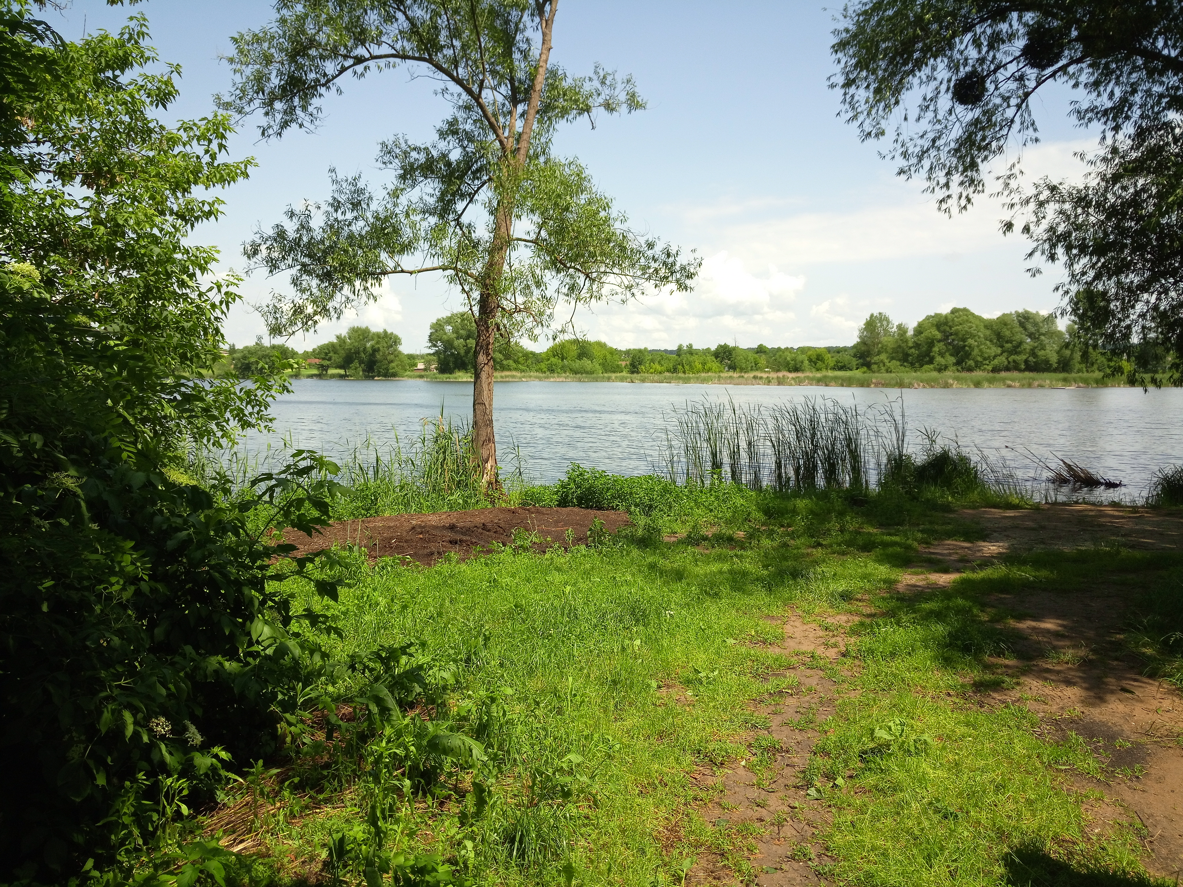 Річка Вербич у межах села Гунчі, верхній ставок (2)